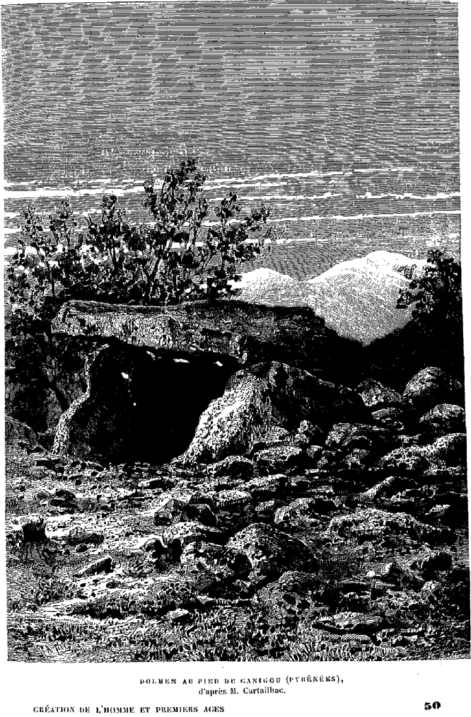 Gravure représentant le dolmen Caixa de Rotllan à Arles-sur-Tech